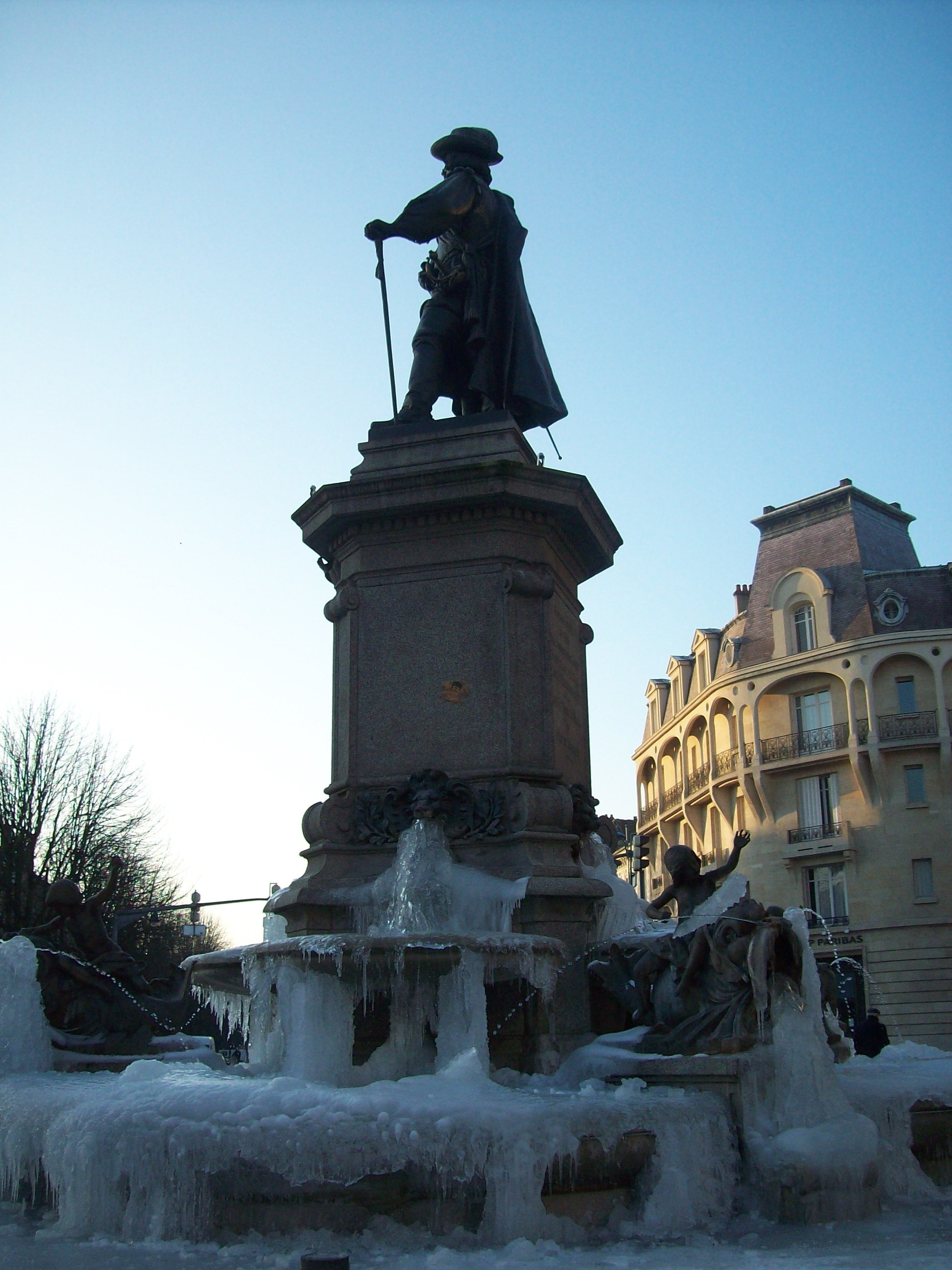 fontaine Charles de GOnzagues à Charleville-Mézières.